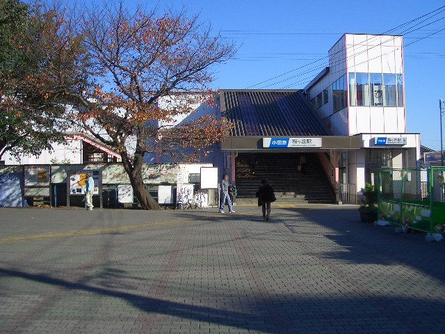 Sakuragaoka Station west exit, on the Odakyu Enoshima Line, Yamato, Kanagawa 桜ヶ丘駅